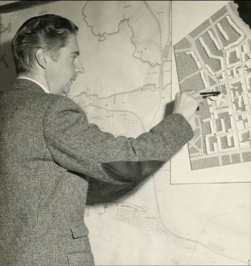 Stadsarkitekt Klas Grebius, sekreterare i byggnadskommittén för Restaurang Slottsholmen